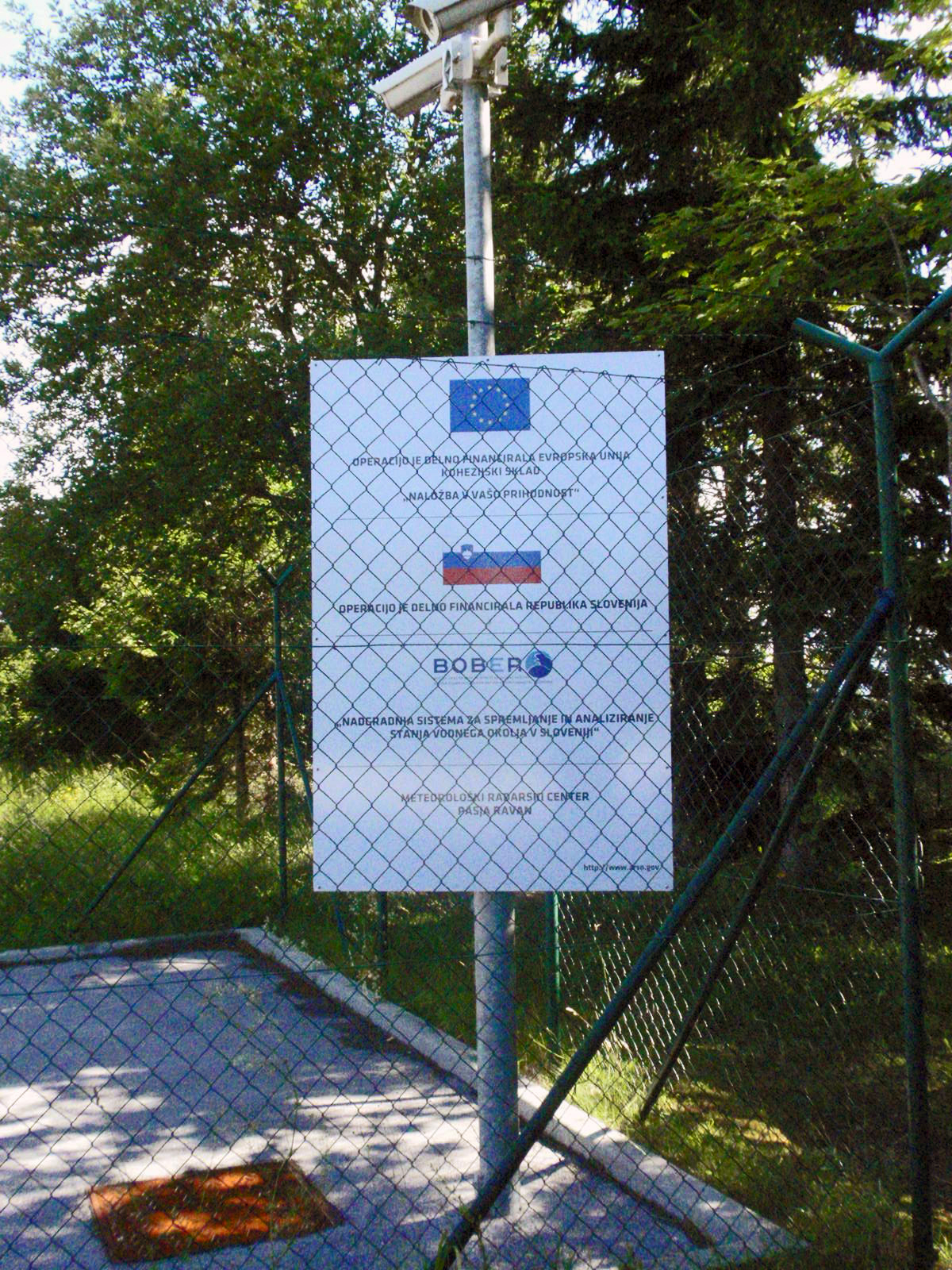 Tabla o projektu Bober in varnostne kamere.